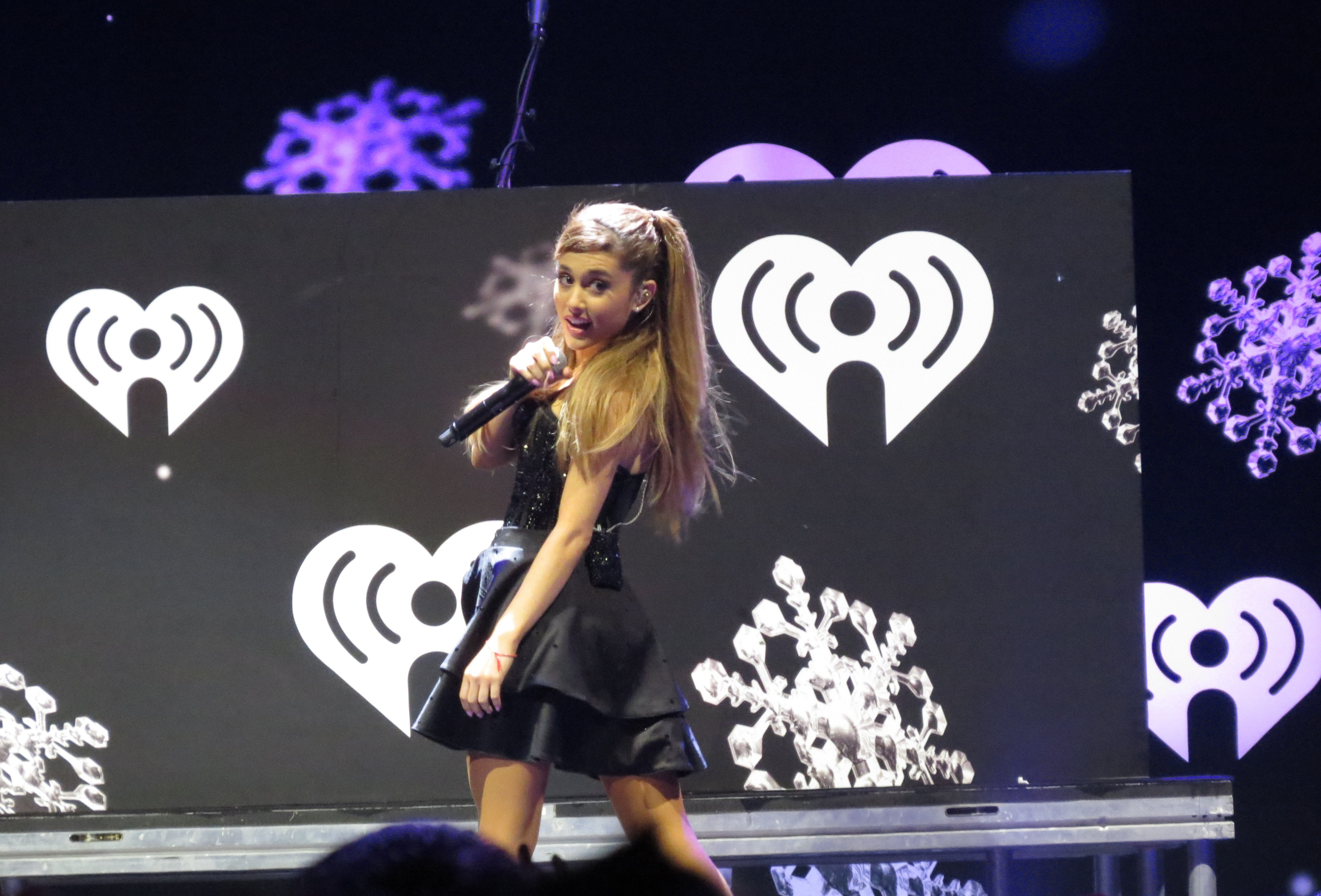 Ariana Grande